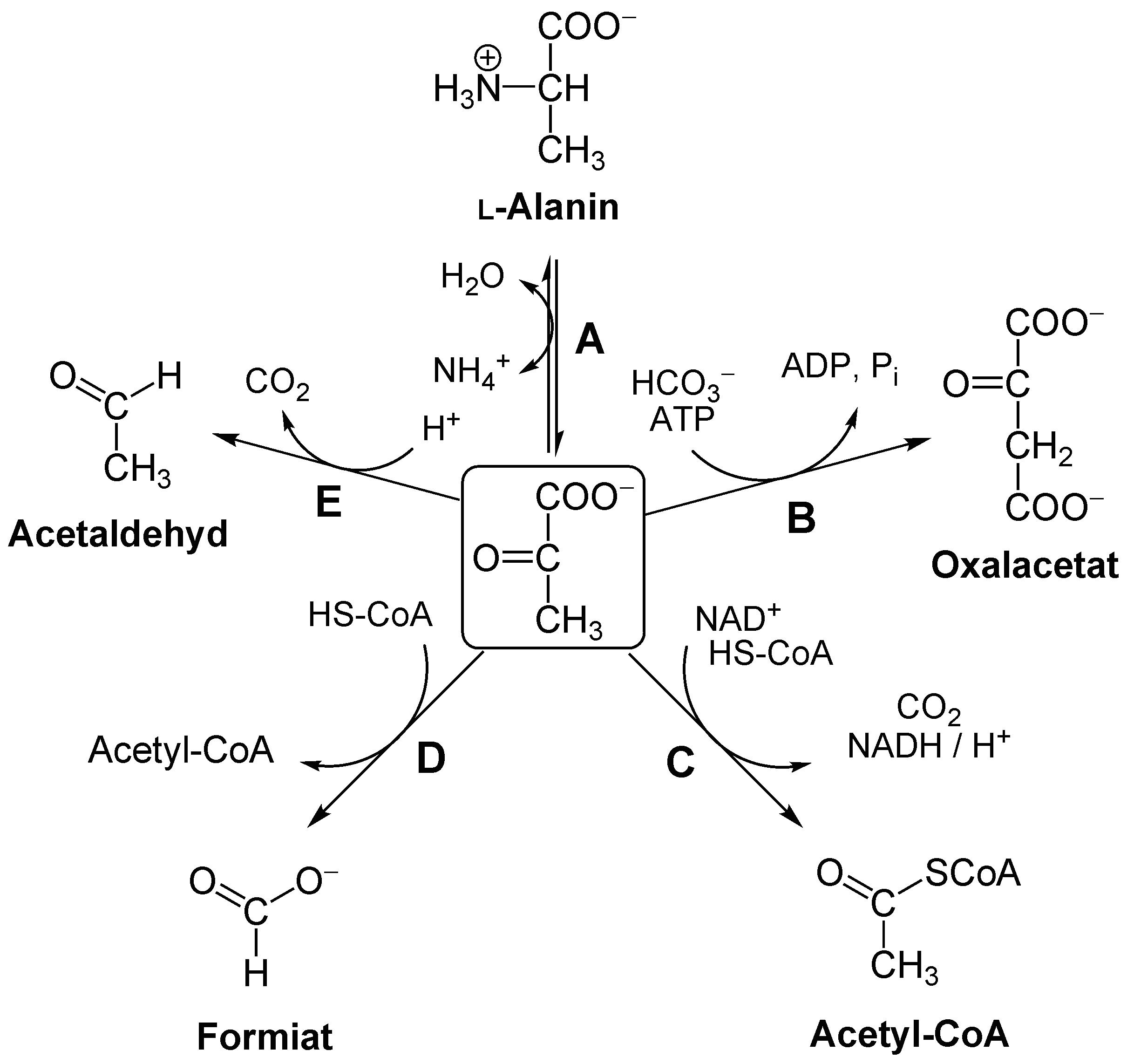 Beispiele möglicher Reaktion ausgehend von Pyruvat